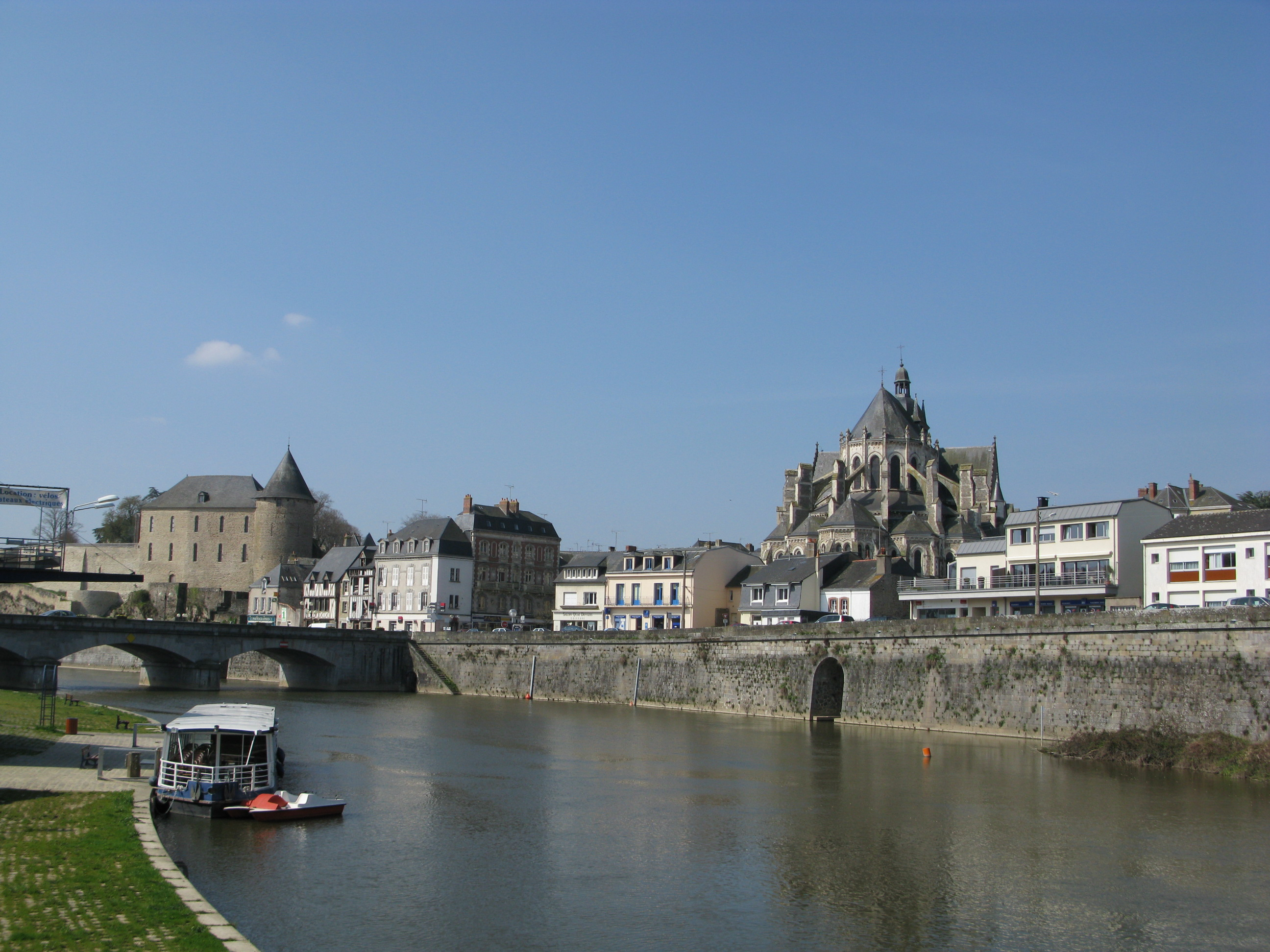 Le château, l'église et les quais de Mayenne